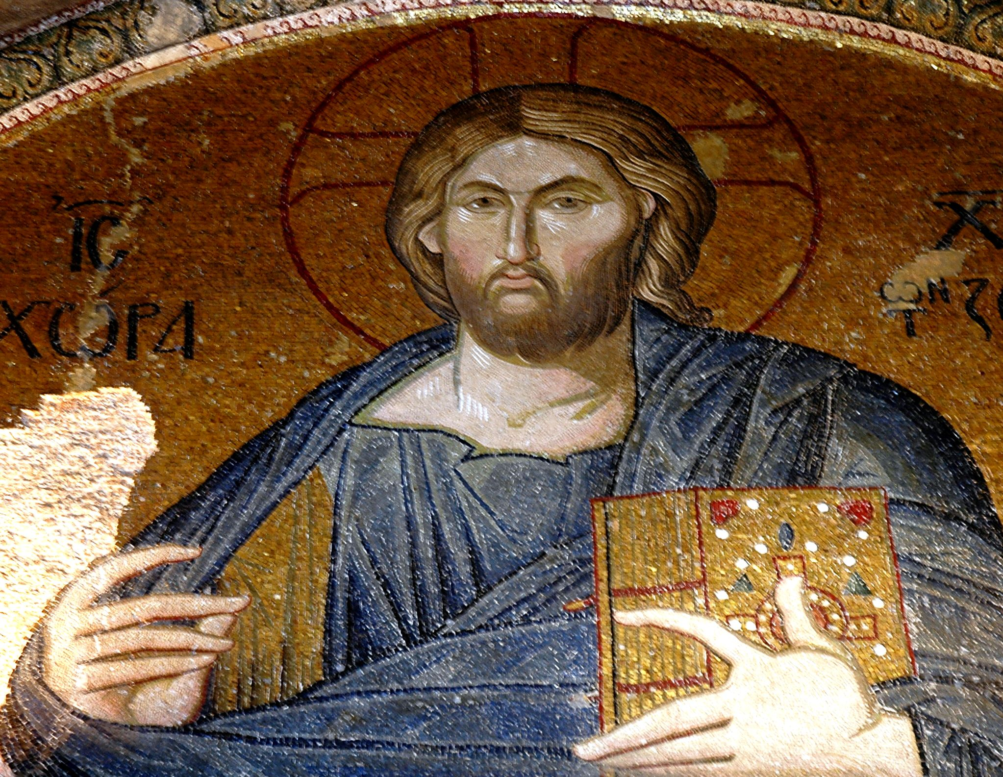 Sant Salvador de Khora - Crist Pantocrator